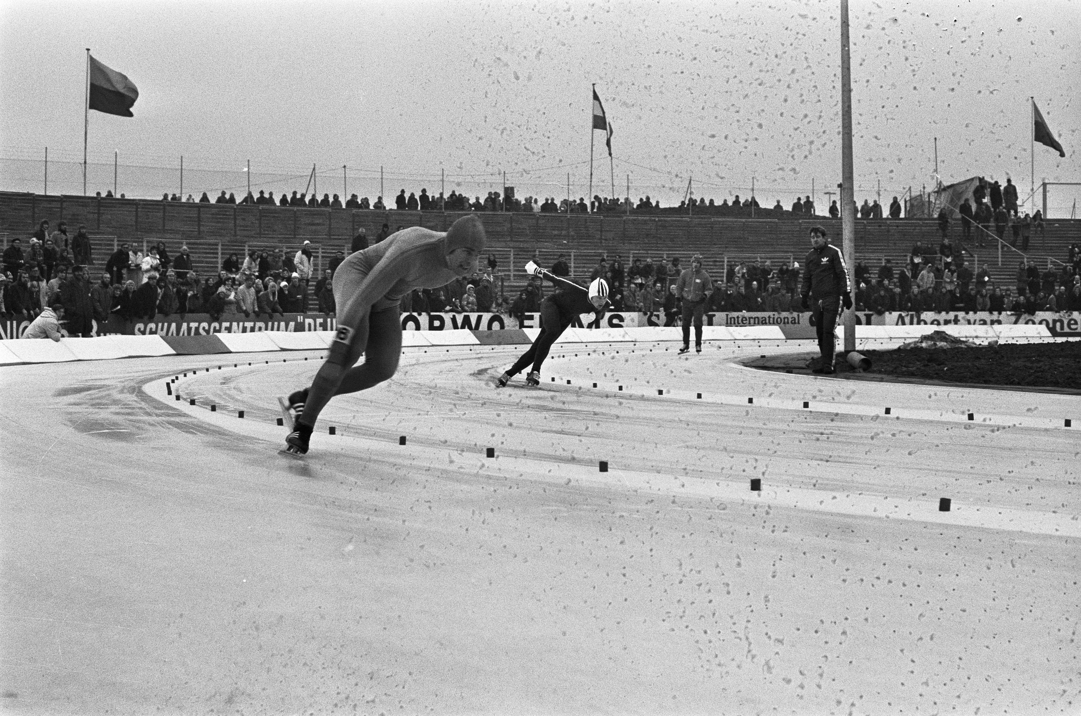 Collectie / Archief : Fotocollectie Anefo Reportage / Serie : [ onbekend ] Beschrijving : Schaatswedstrijden voor eerste ISSL World Cup voor prof op De Uithof in Den Haag , Ard Schenk (voorgrond) op 500 meter in aktie tegen Olsen, achtergrond lege Datum : 6 januari 1973 Locatie : Den Haag, Zuid-Holland Trefwoorden : SCHAATSEN, sport Persoonsnaam : De Uithof, Issl World Cup, Schenk, Ard Fotograaf : Verhoeff, Bert / Anefo Auteursrechthebbende : Nationaal Archief Materiaalsoort : Negatief (zwart/wit) Nummer archiefinventaris : bekijk toegang 2.24.01.05 Bestanddeelnummer : 926-1414